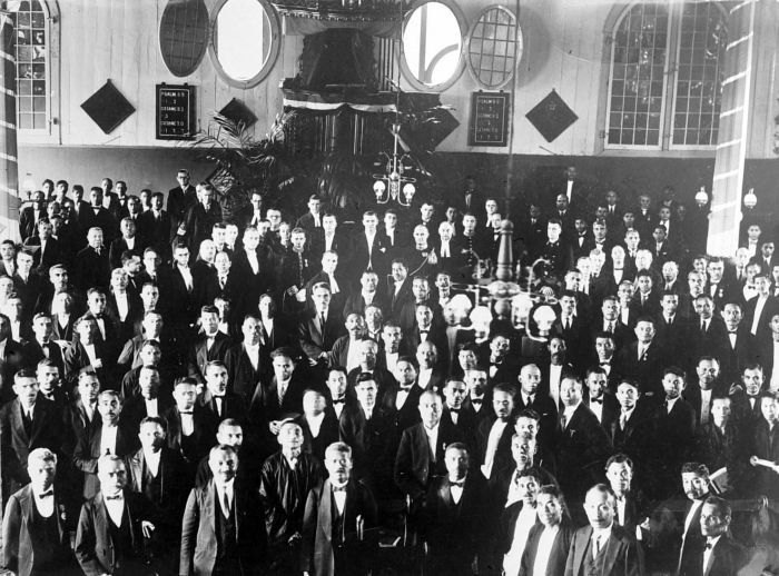 Repronegatief. Een groep mannen na de instituering van de M.P. in de kerk op Ambon.